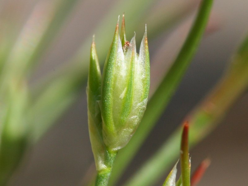 Kröten-Binse (Juncus bufonius), Detail der Einzelblüte